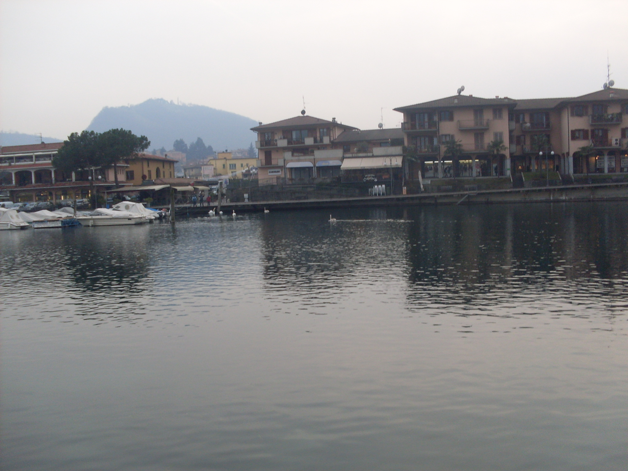 Приватна фотографија